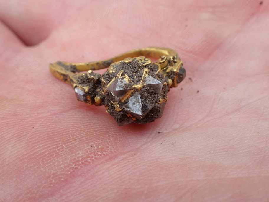 Guldring forsynet med 7 slebne diamanter fundet i Tåsinge. Den vejer 7 gram og kan dateres til første halvdel af 1600-tallet.